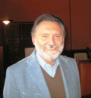 Francesco Maria Raimondo